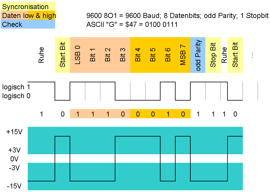 RS232: logische Sig. und Spannungspegel über die Zeit